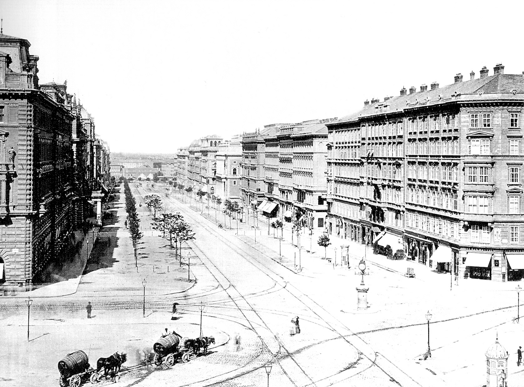 Der Schottenring in Wien um 1875